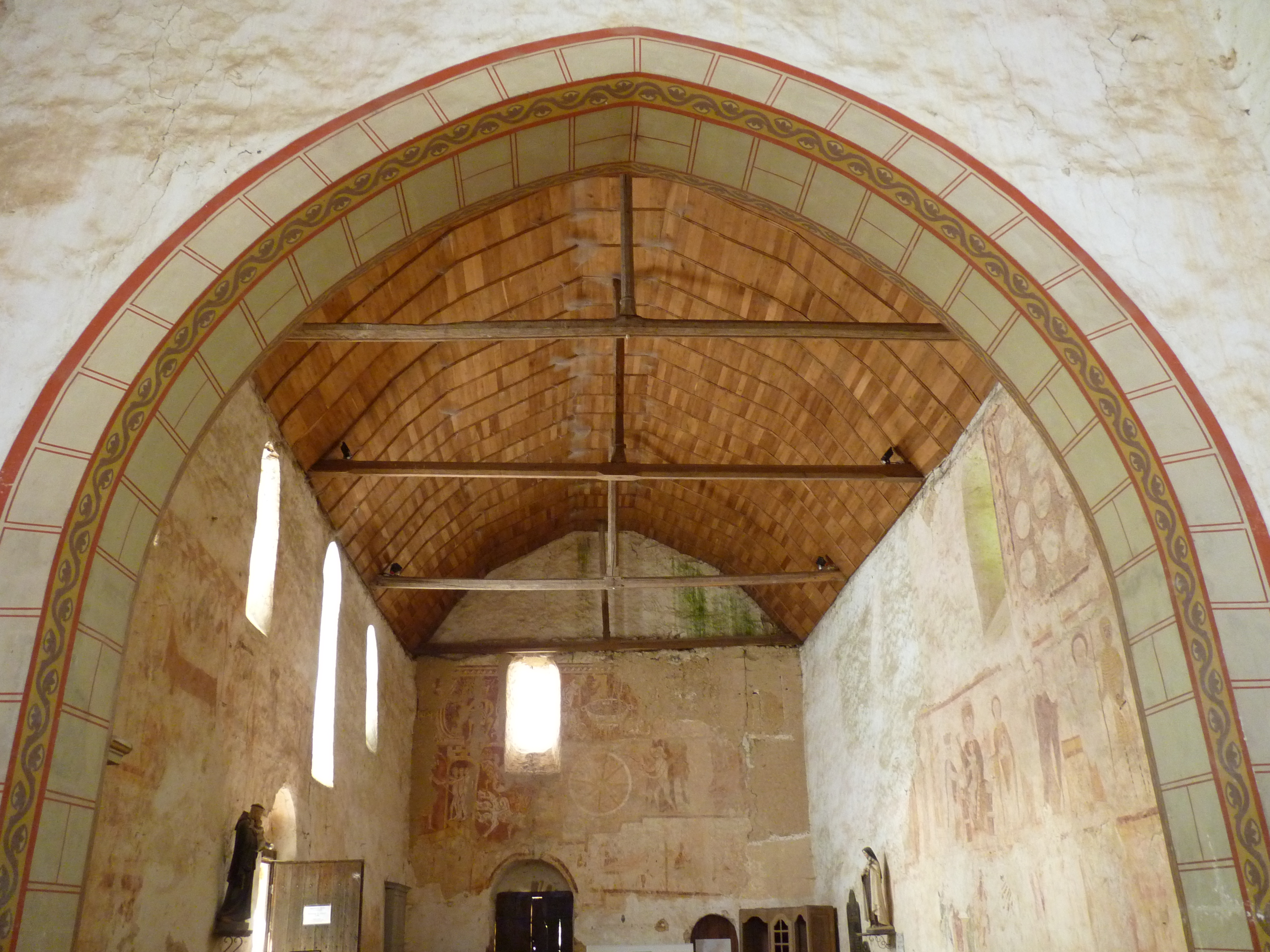 Sarthe - Asnières-sur-Vègre - Fresques de l'église